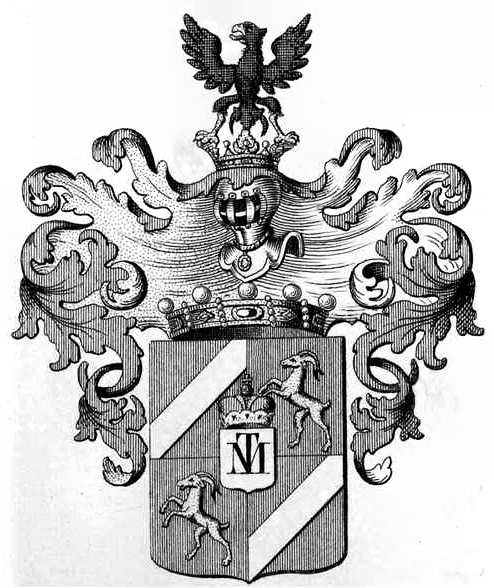 Wappen der Freiherren von Amadey 1760, erstmalig für GFWM Karl von Amadey